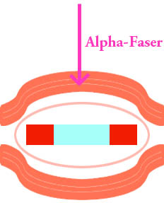 Muskelspindel; selbst erstellt; gemeinfrei